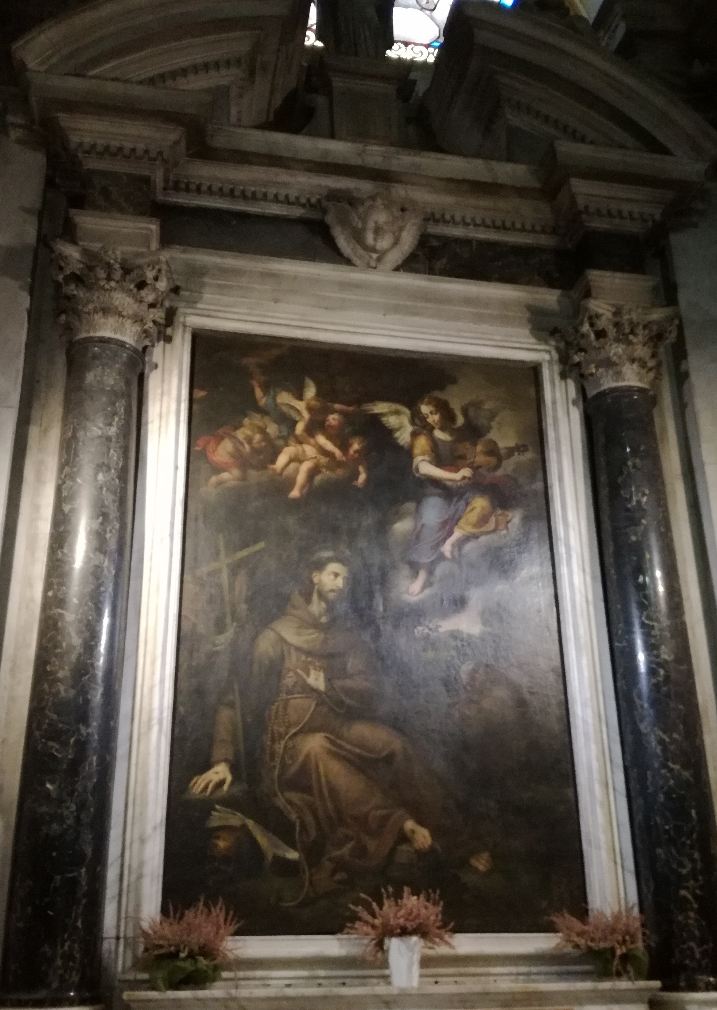 Nostra Signora del Monte (Genova), S. Francesco in estasi di Domenico Fiasella